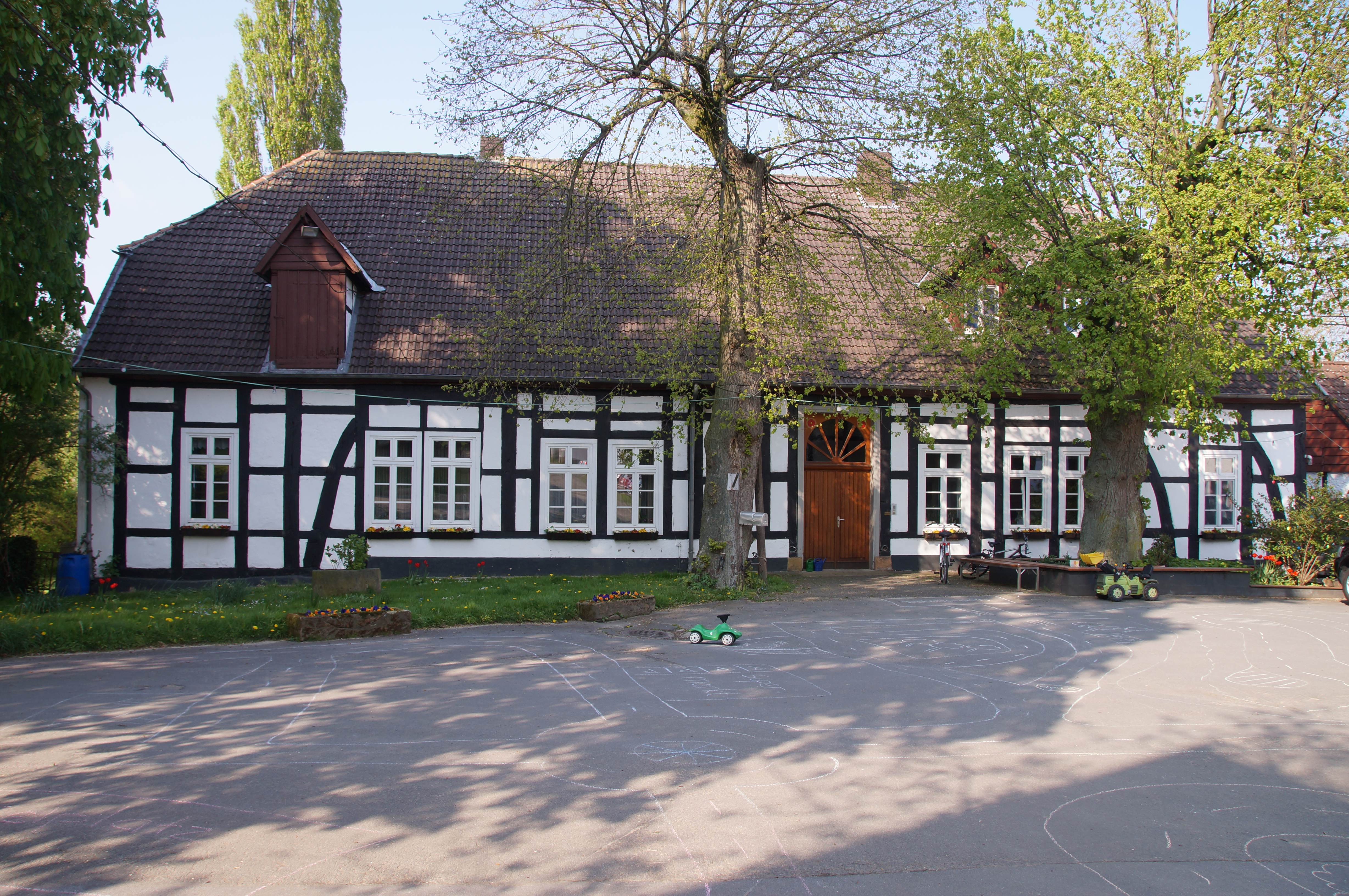 Dahlhausen in Leopoldshöhe, Germany This is a photograph of an architectural monument.